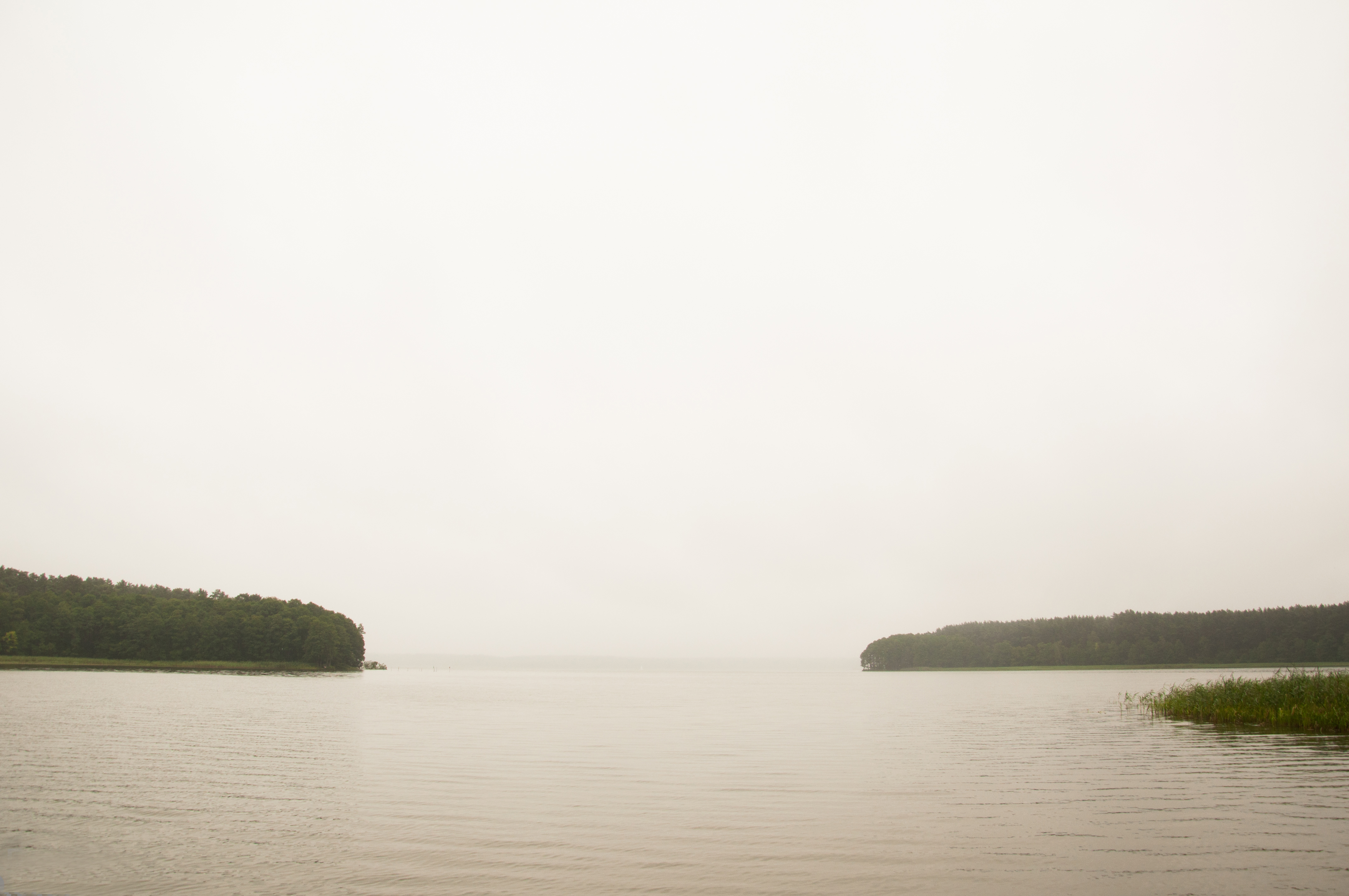 Specjalny obszar ochrony siedlisk Ostoja Piska. This is a photography of Natura 2000 protected area with ID PLH280048